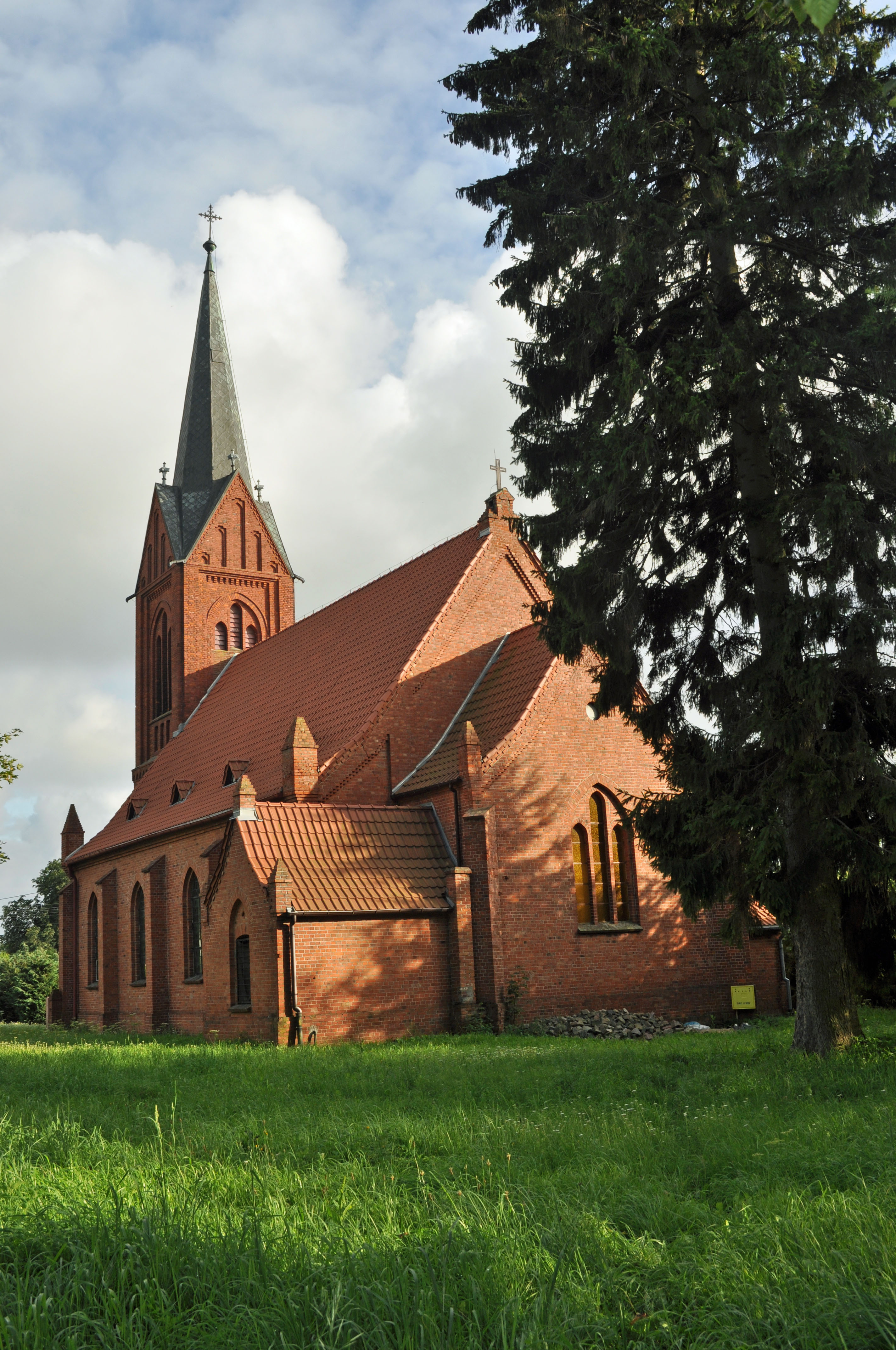 Gostyń - rzymskokatolicki kościół parafialny p.w. NMP Królowej Polski